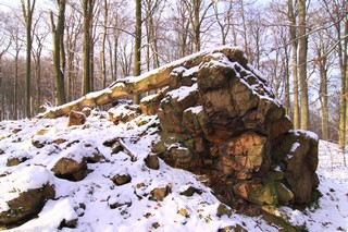 ryolit v kohoutově